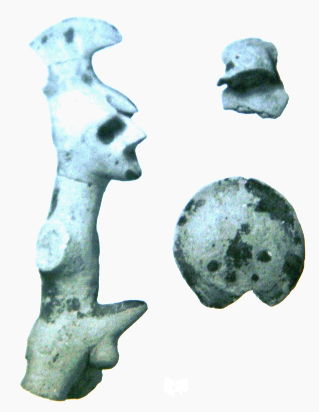 Guerriero di Polizzello, figurina fittile di guerriero itifallico esposto al Museo archeologico regionale di Caltanissetta